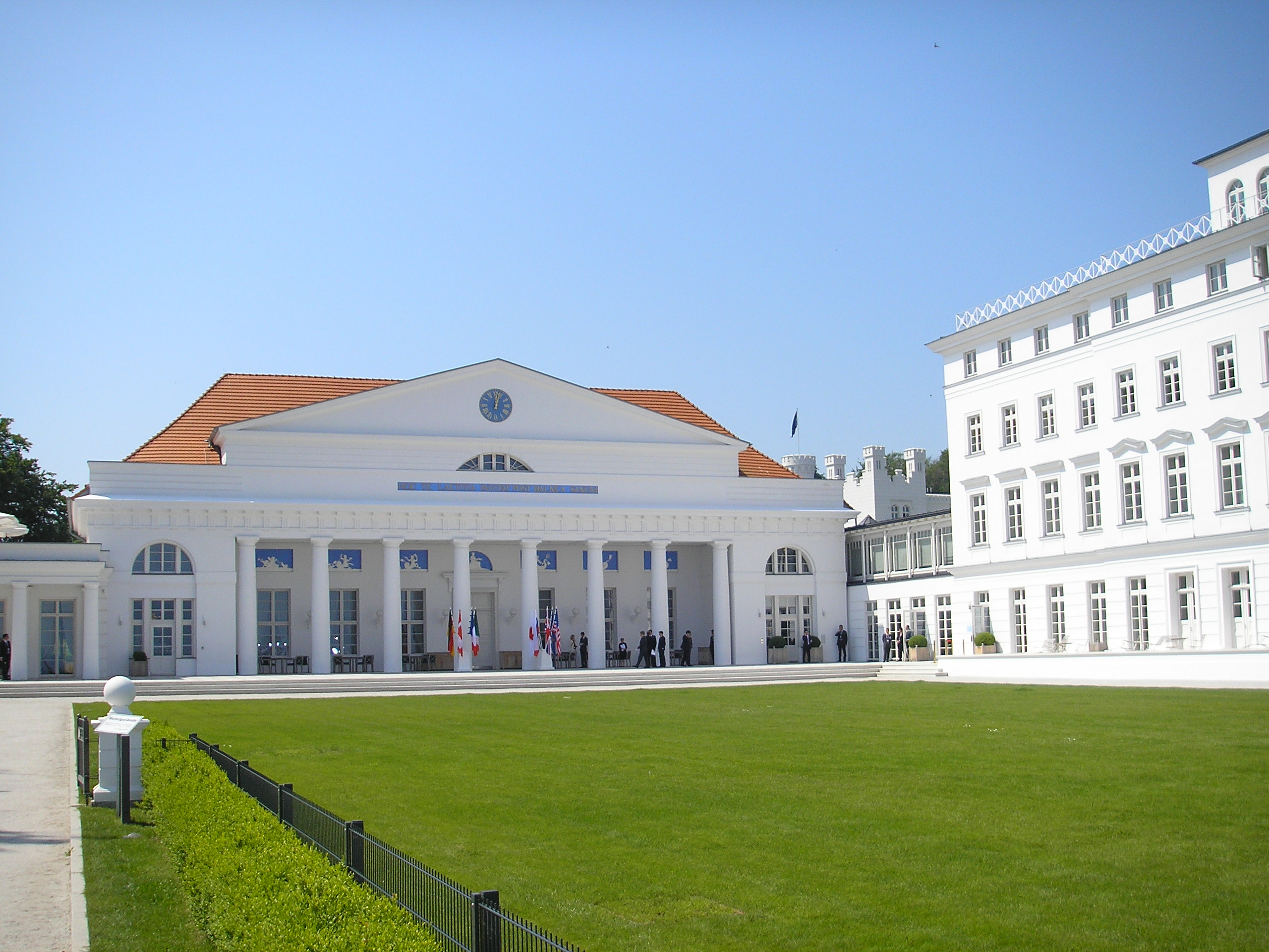 Image of the Kurhaus in Heiligendamm, Germany.